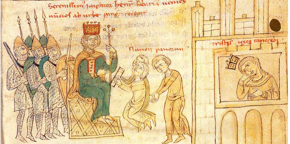 Jindřich VI. štaufský a ve vězení Sibyla z Acerra